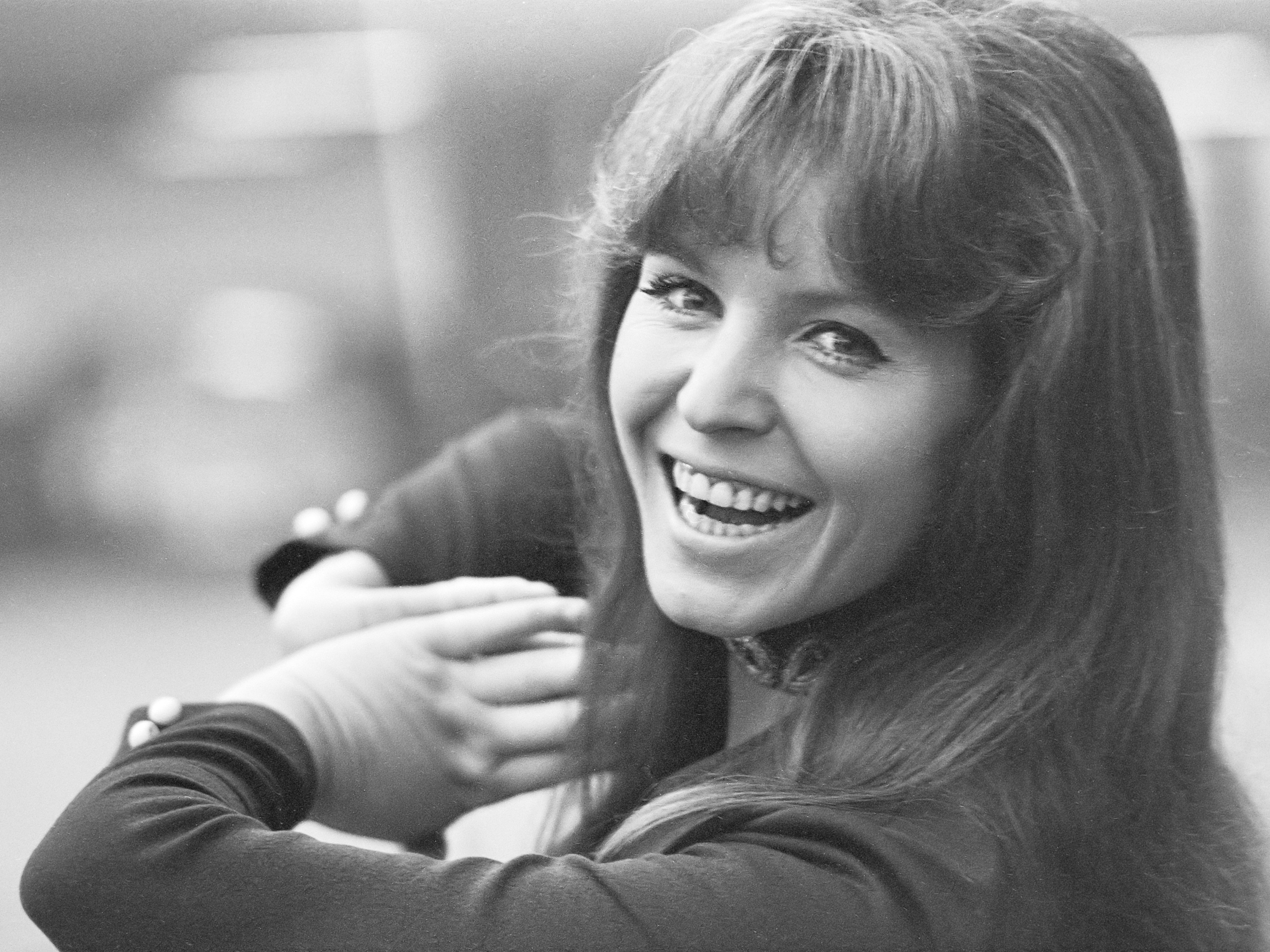 Schlagerzangeres "Manuela" (Duitsland) in Esso Motor Hotel, Amsterdam